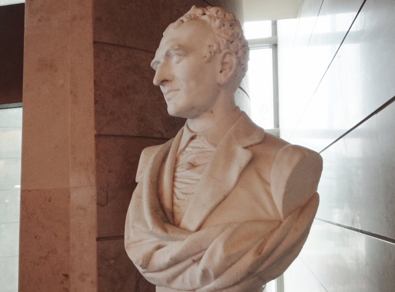 Halmi Ferenc színész mellszobra, alkotó: Szász Gyula